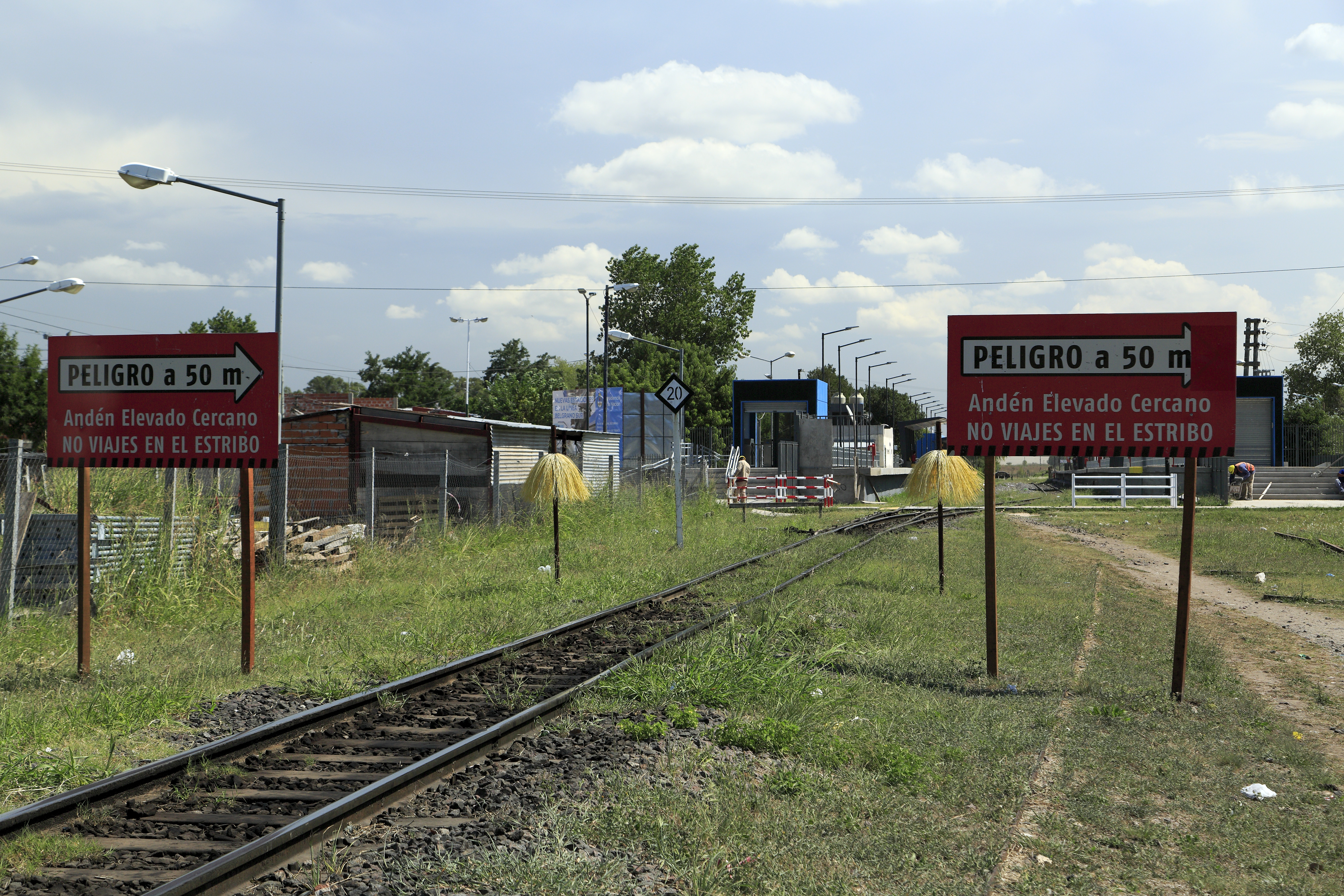 Bahnhof Marinos del Cruzero General Belgrano, nach dem Erhöhen der Bahnsteige auf Wagenbodenhöhe und dem dazugehörenden Anpassen der Einstiege ist ein Stehen auf den Einstiegen im Bahnsteigbereich vollkommen unmöglich. Wer die übergroßen Warnschilder nicht mitbekommt, den kratzen danach die gelben Borsten an den Beinen.Die Weichenzungen sind wie meist gerade, die Folge ist ein sichtbar starker Fahrkantenverschleiß an der linken Zunge.